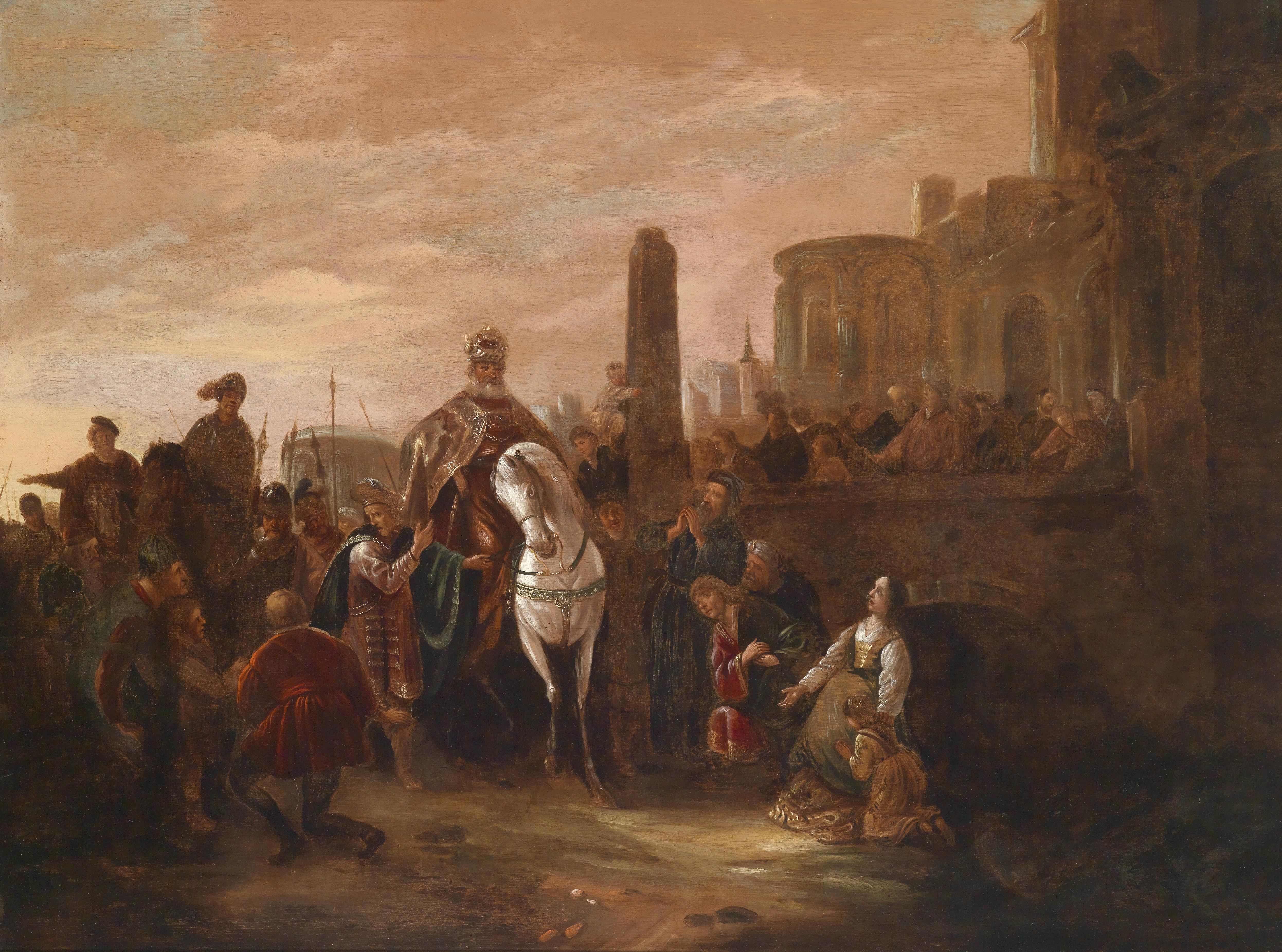 Der Triumph des Mordechai, Öl auf Holz, 77 x 110 cm Provenienz: Auktion Sotheby's, London, Mai 1999; Rheinische Privatsammlung